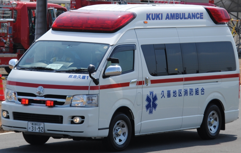 久喜地区消防組合の救急車